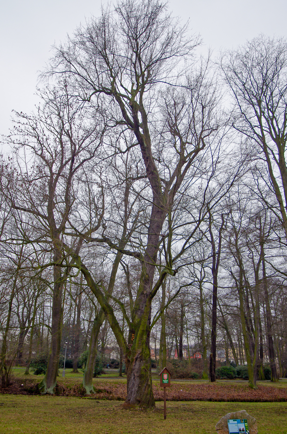 památný strom - Stříbrný javor v Husových sadech v Sokolově.